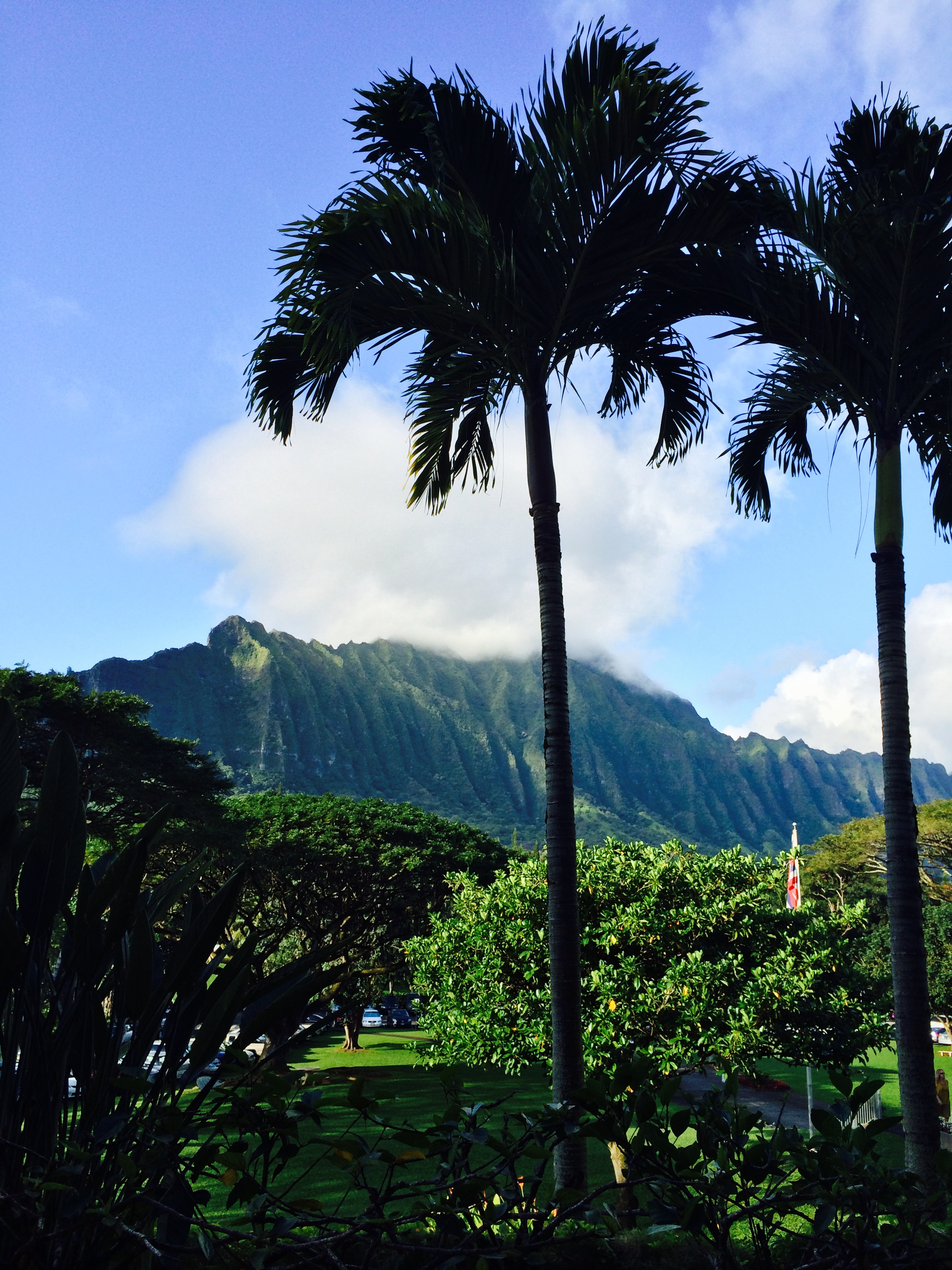 Koolau mountains